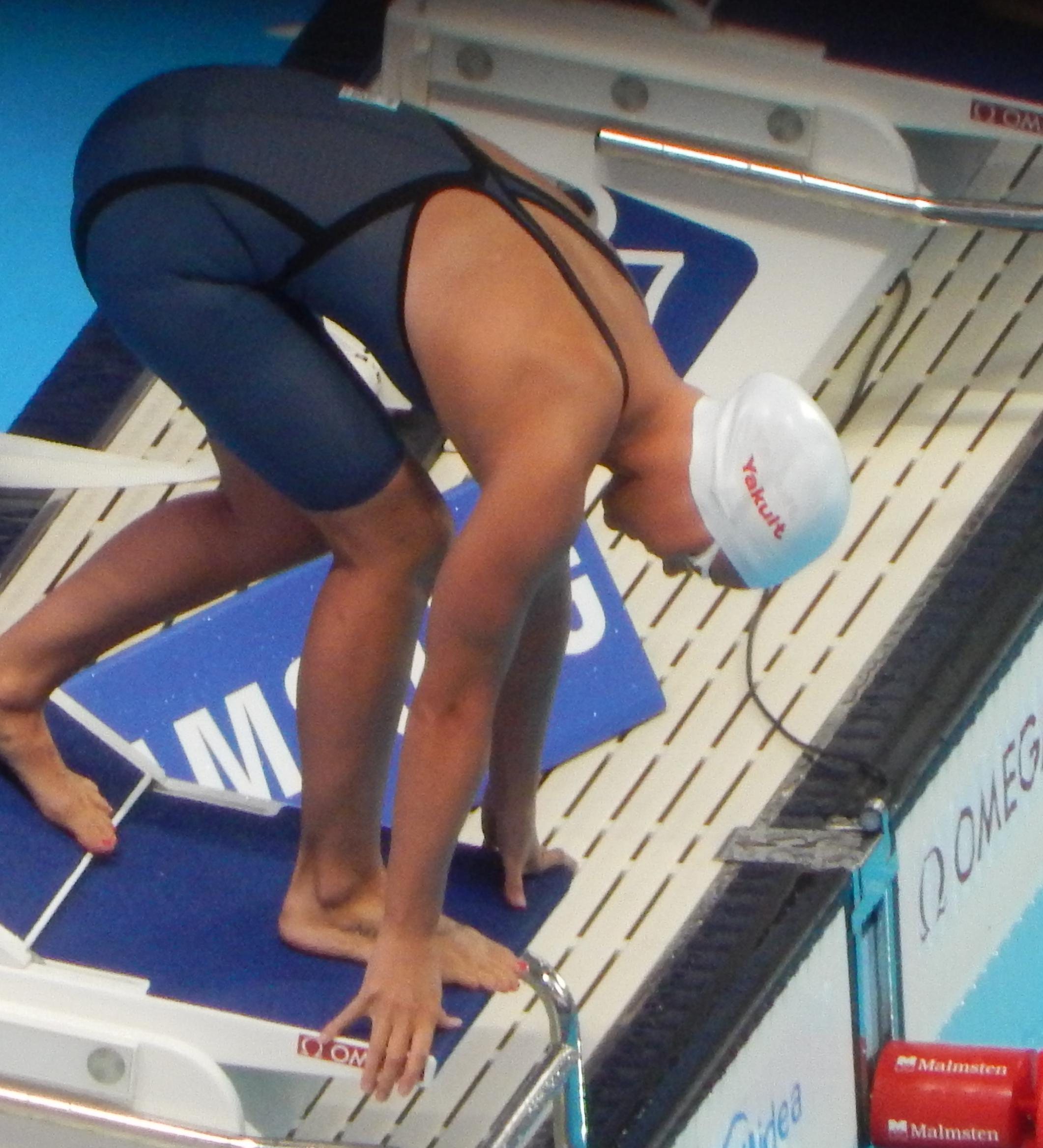 Пернил Блюм на чемпионате мира в Казани